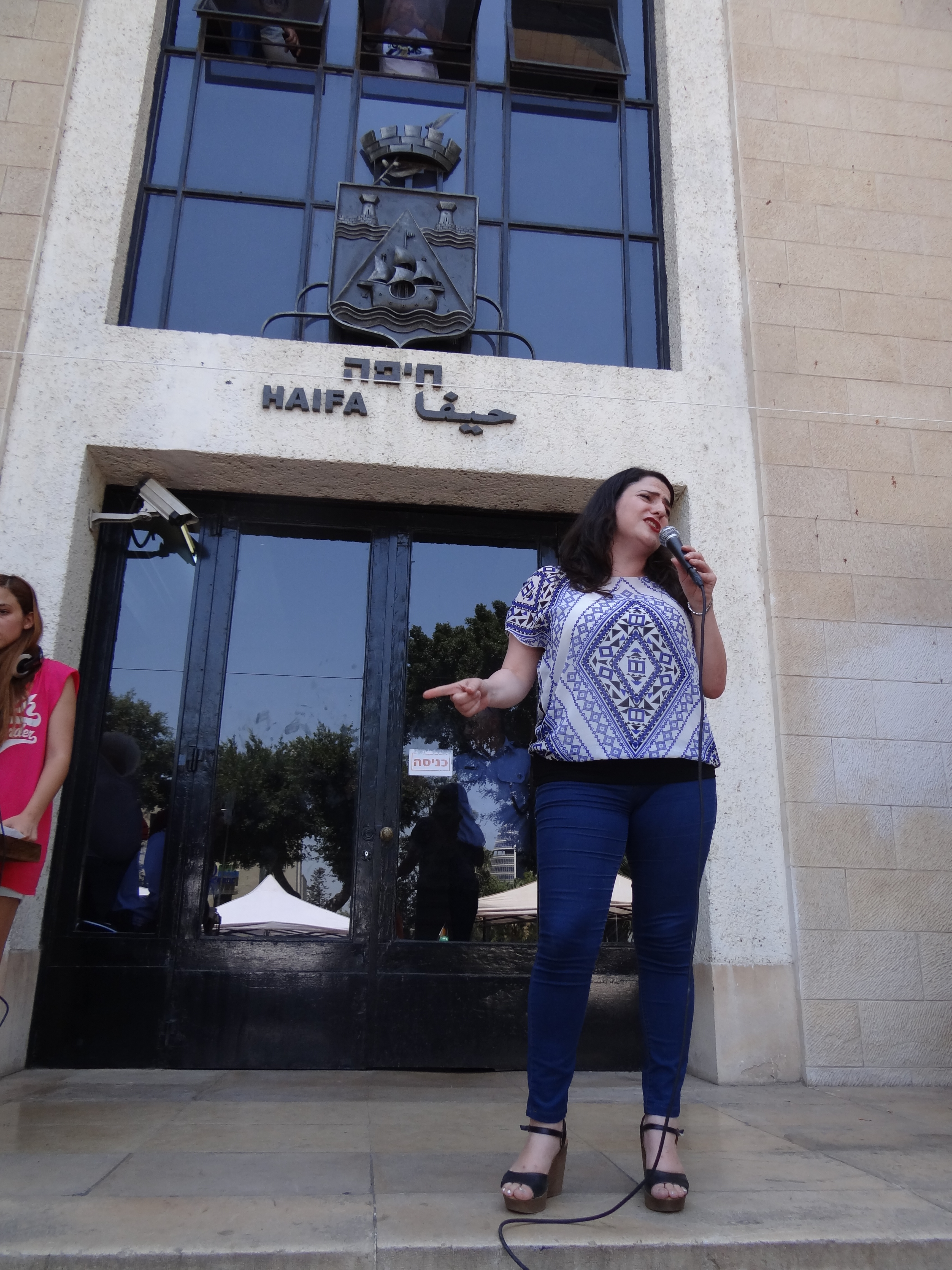 מיכל בירן בעצרת מצעד הגאווה בחיפה 2014